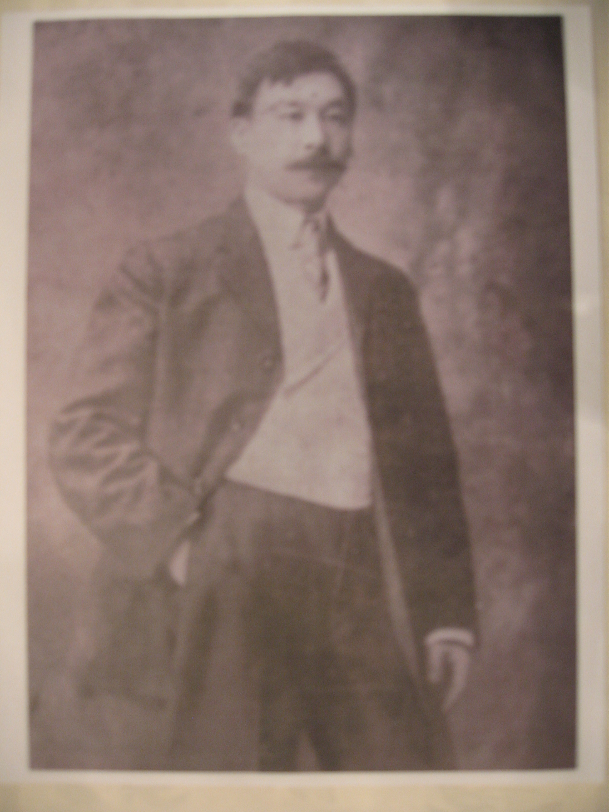 江藤源次郎